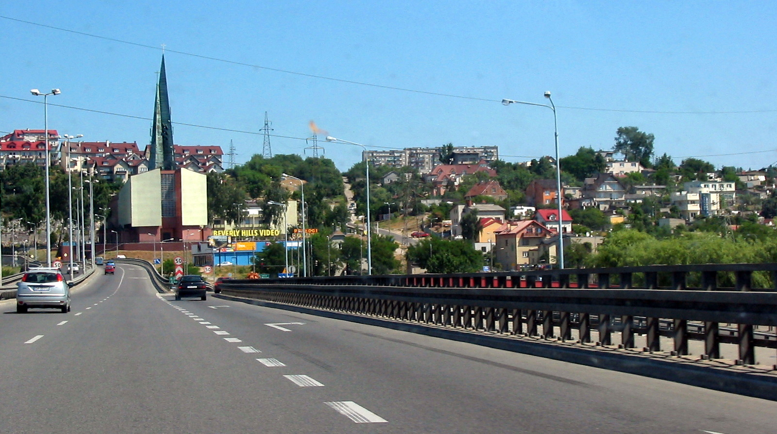 Gdynia, Trasa im. Eugeniusza Kwiatkowskiego → Obłuże. Kościół św. Andrzeja Boboli